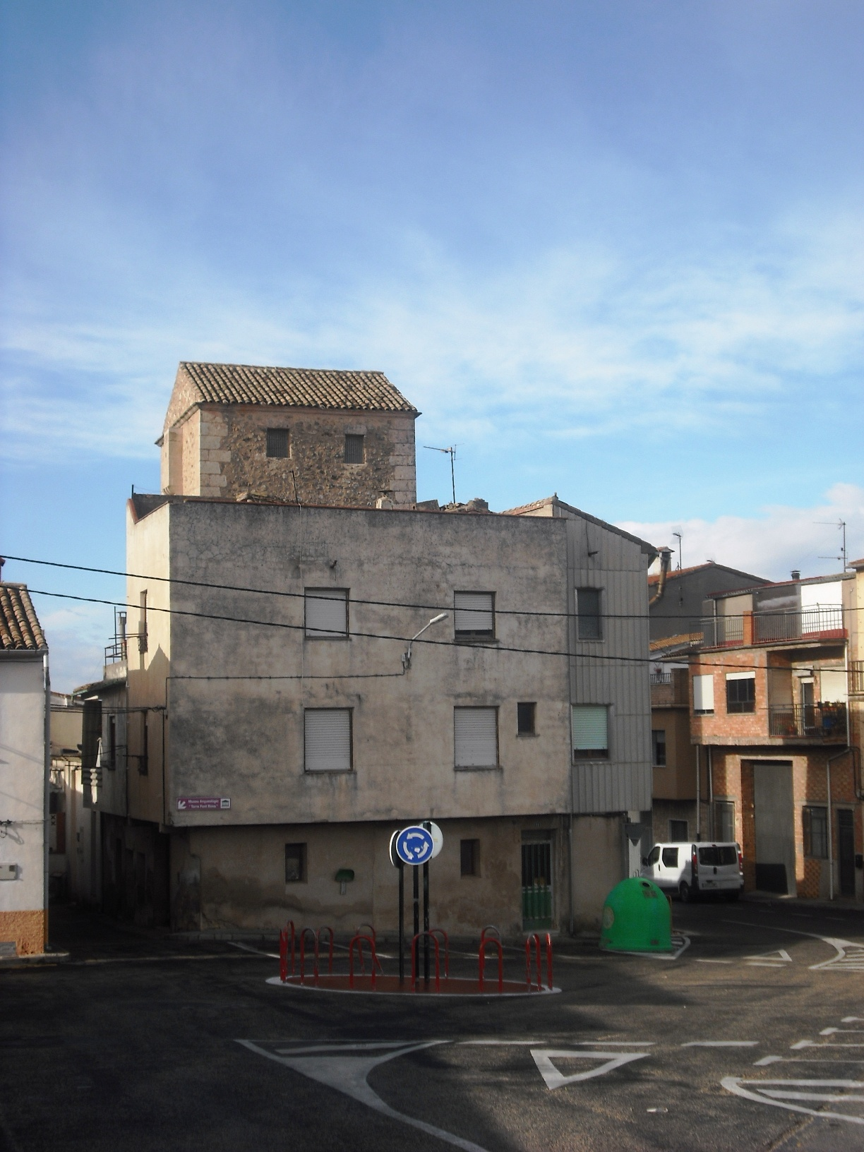 Carer de la Font Bona.